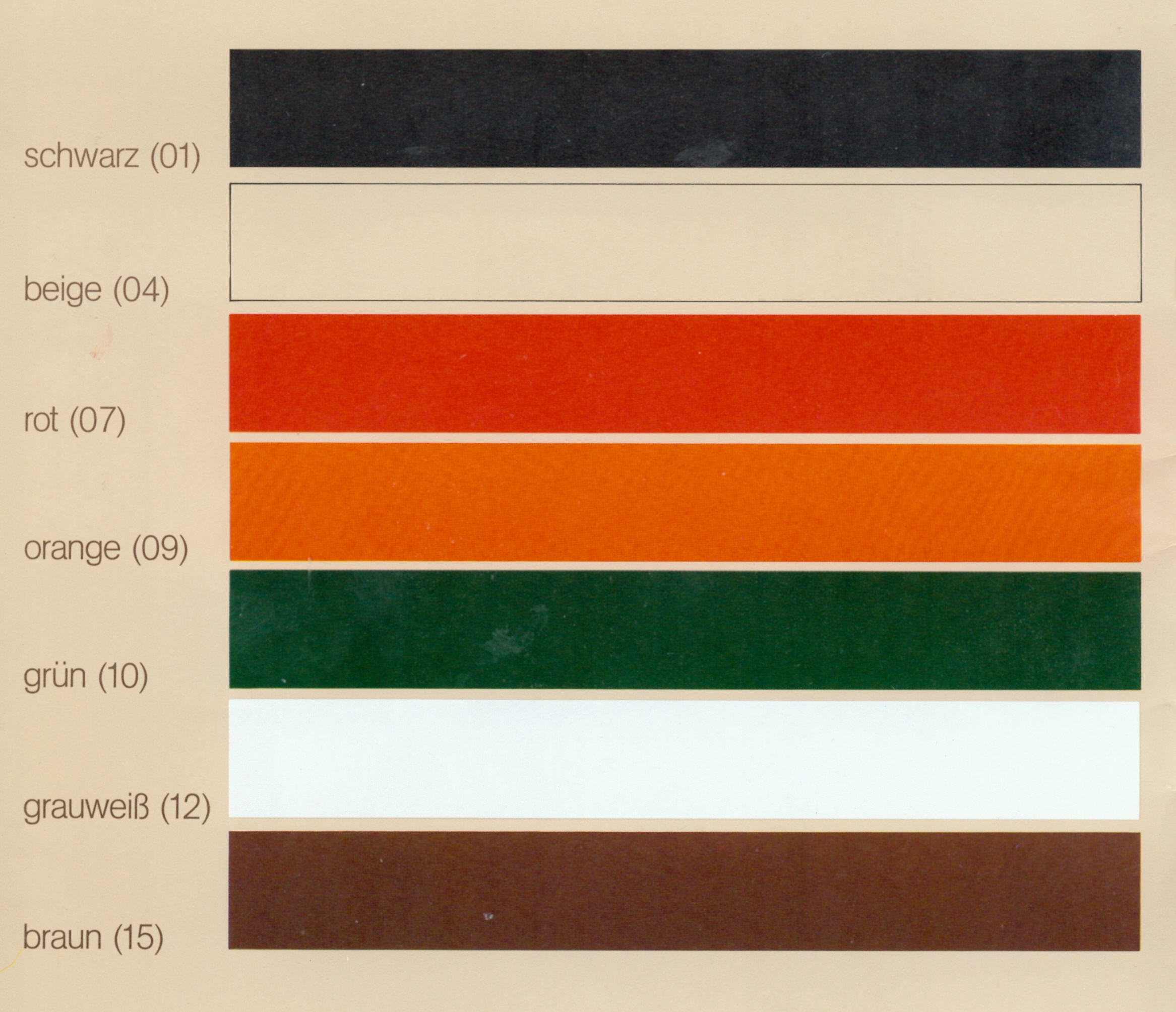 Vollständige Farbpalette aus dem Prospekt "Bürogeräte 84/85" der Zwingo GmbH, Murr/Württemberg (ZWINGO-Form 1111/10.83, Prospekt für Briefkörbe, Hängemappenwagen, Papierkörbe und Ascher)